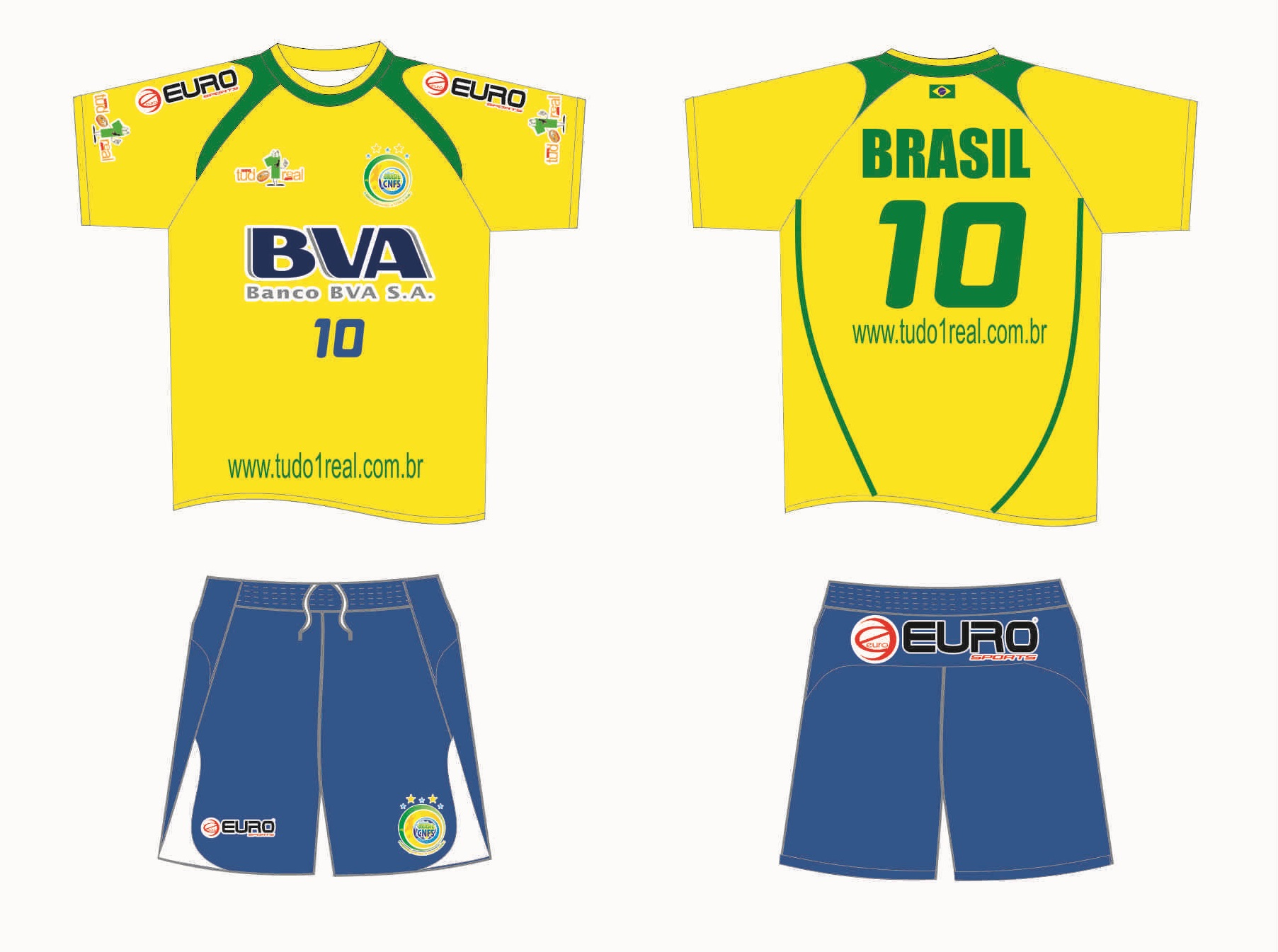 Uniforme utilizado pela seleção brasileira de futebol de salão (CNFS) em 2012 / 2013.